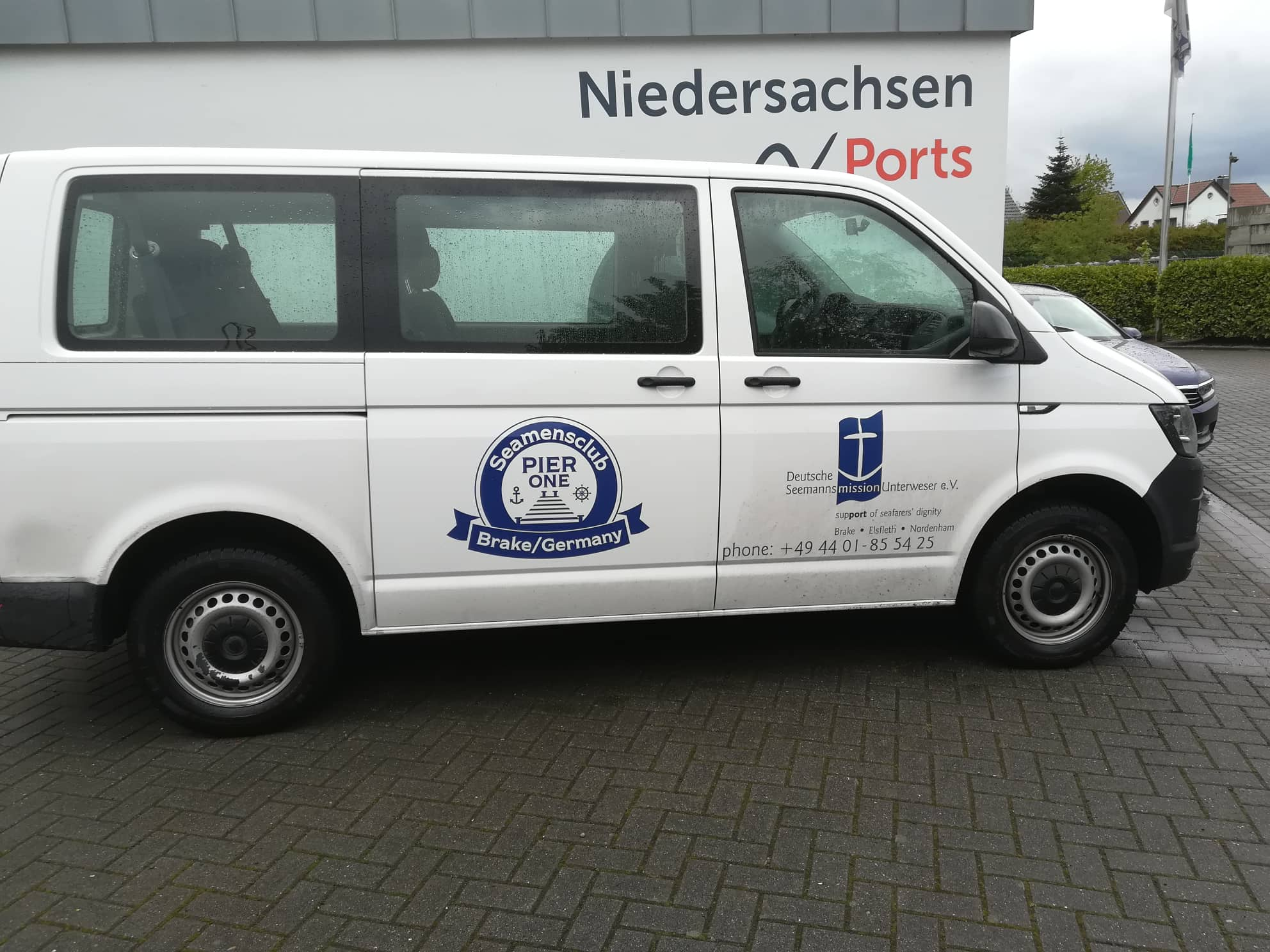 Shuttle-Bus des Seemannsclub Pier-One Brake